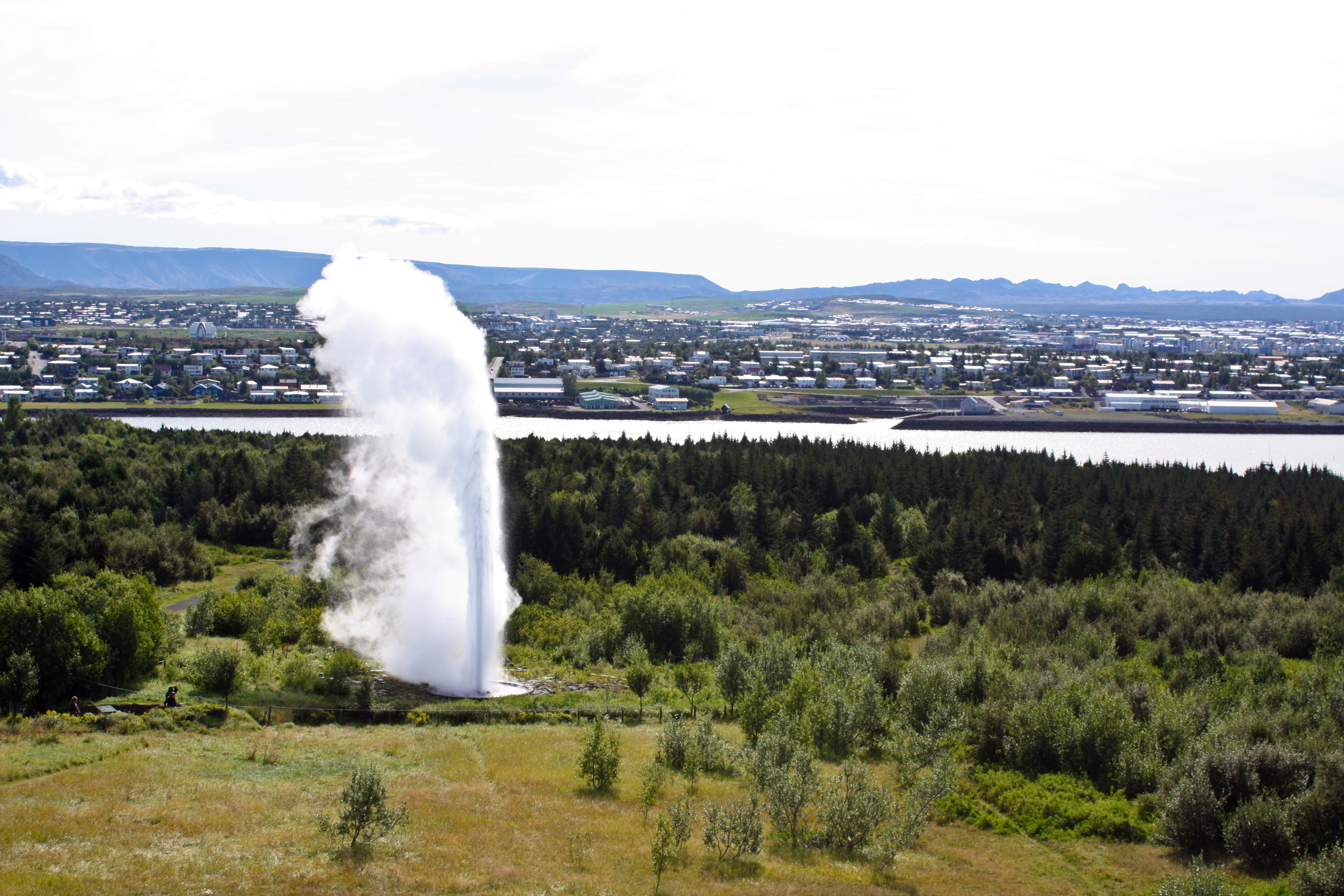 Gayser near Reykjavik